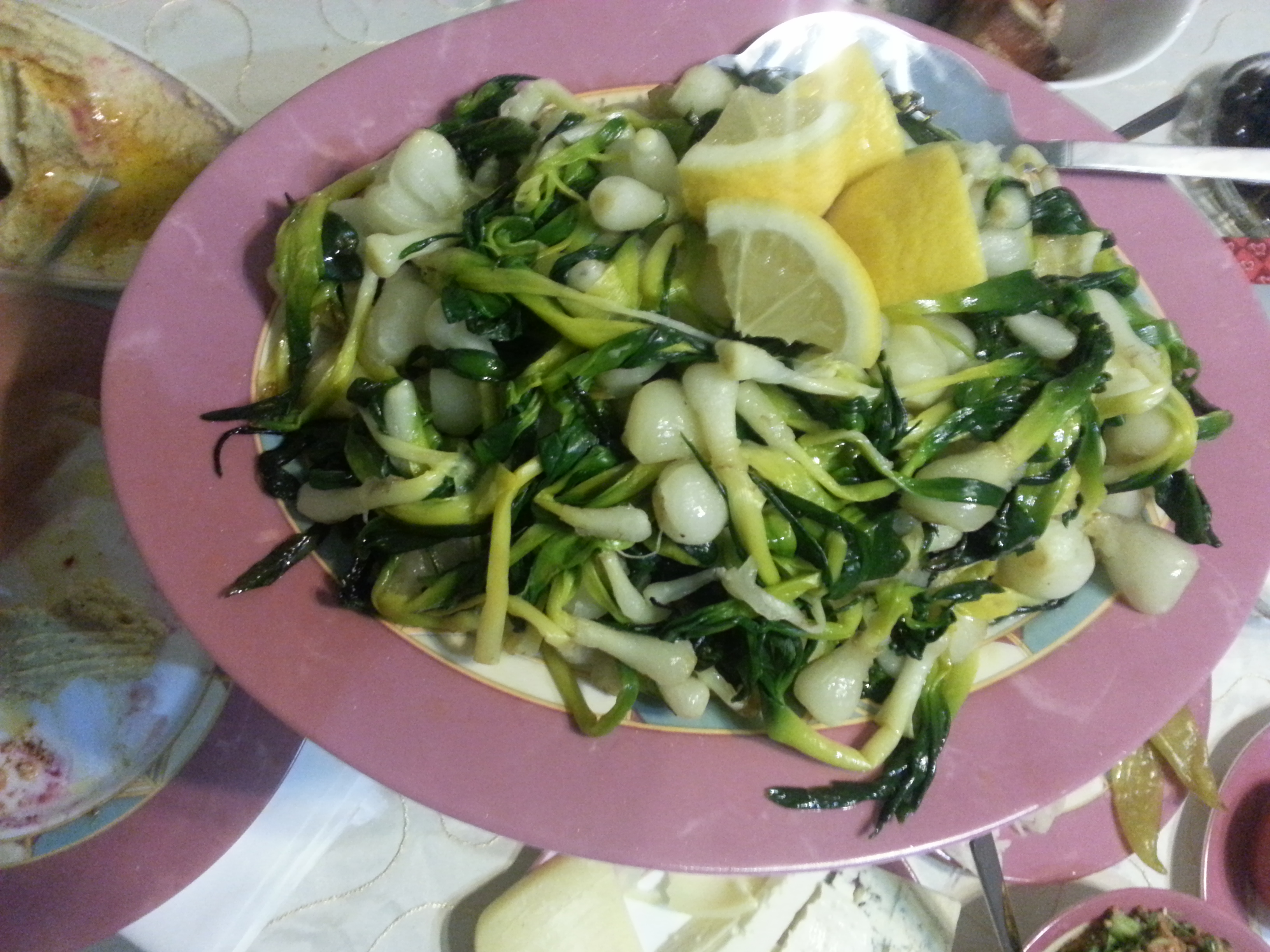 Խնջլոզ, Արցախի պասային ուտեստ